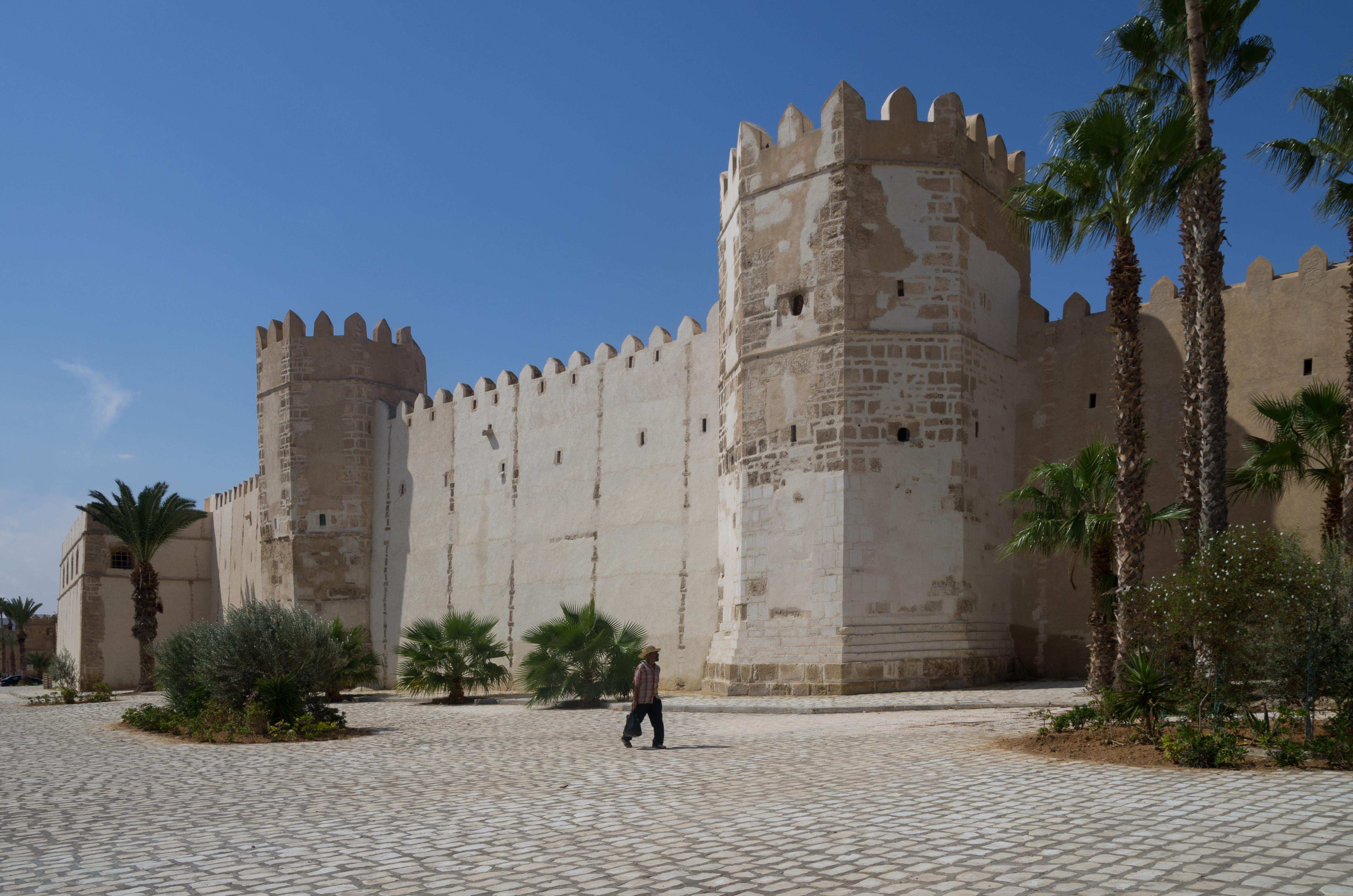 Remparts de la medina de Sfax (Tunisie)